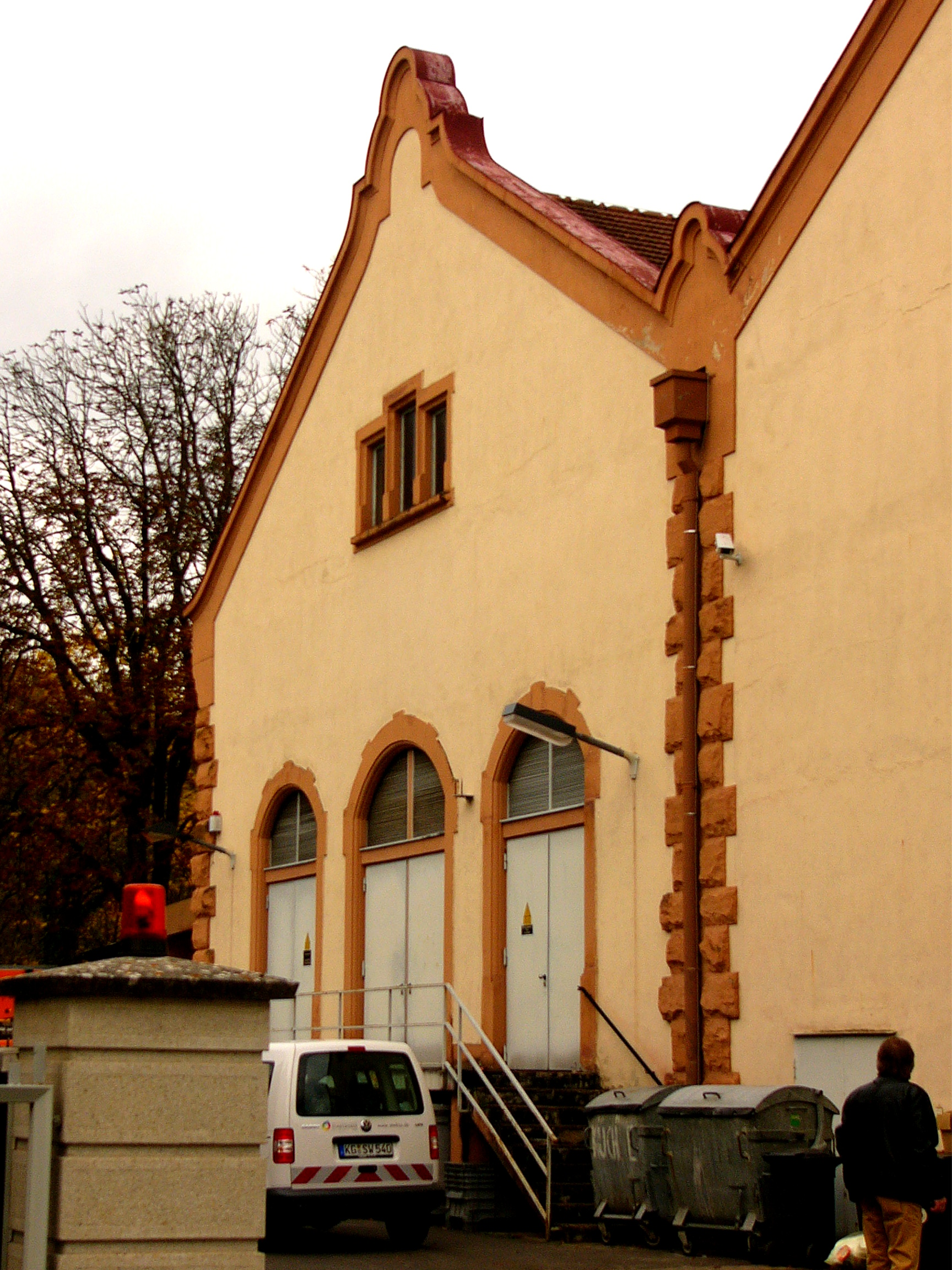 Ehemals Elektrizitätswerk; Maschinenhaus mit technischer Ausstattung der 1920er Jahre. This is a photograph of an architectural monument.